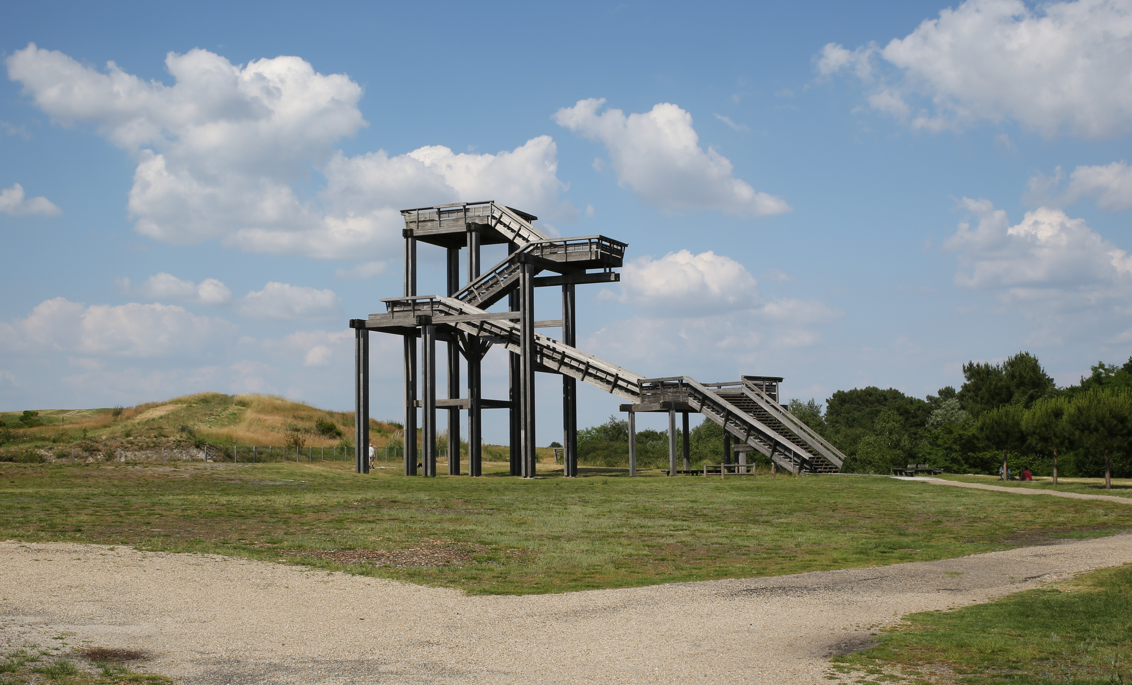 Belvédère au parc du Bourgailh, Pessac, France.